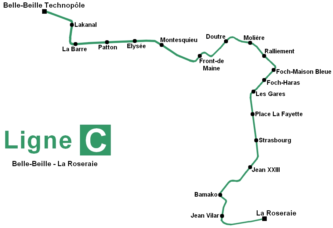 Tracé géographique de la future ligne C du tramway d'Angers